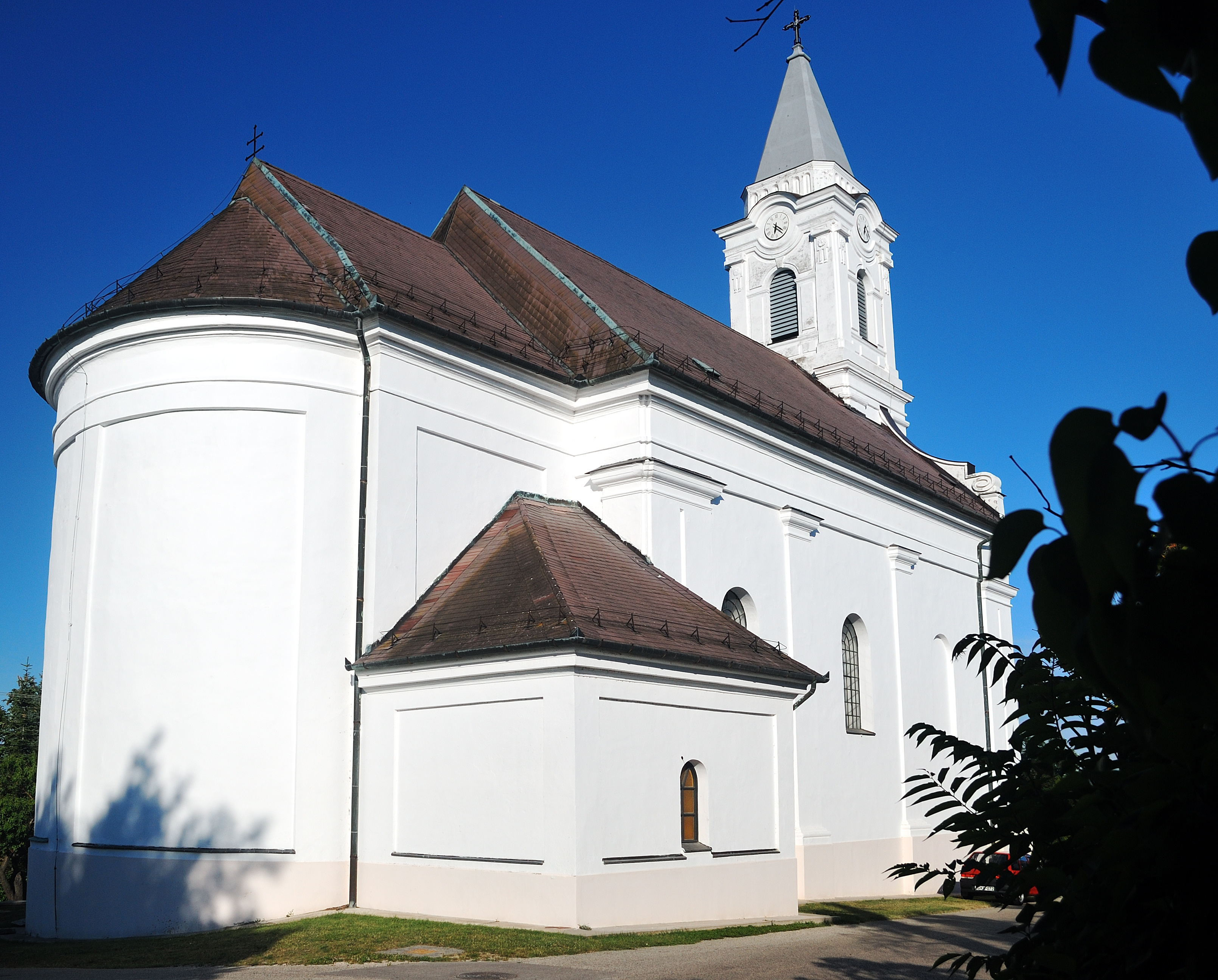 Aszófői Szent László-templom